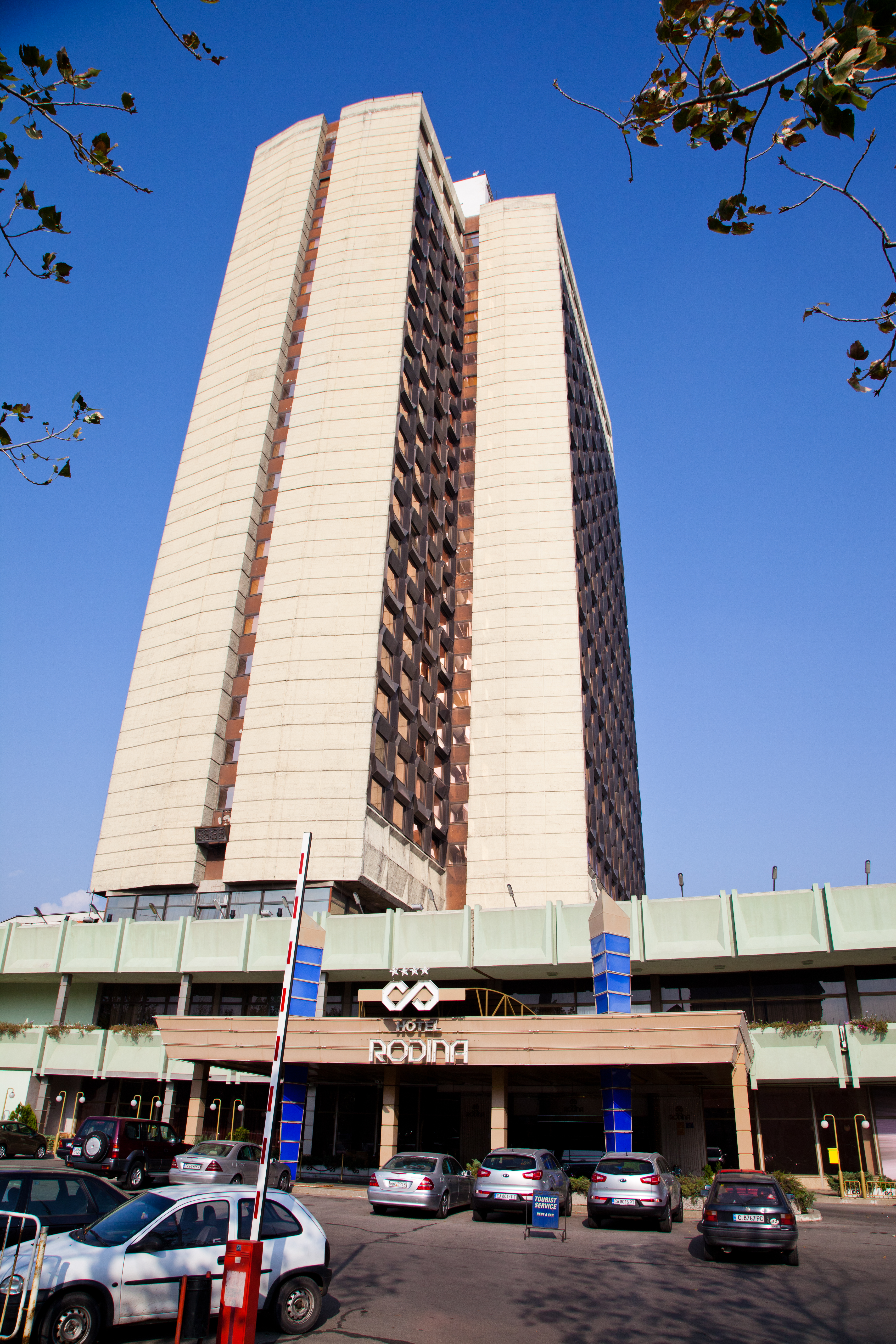 Sofia; Hotel Rodina, in der Nähe des Russki pametnik, Boulevard Totleben